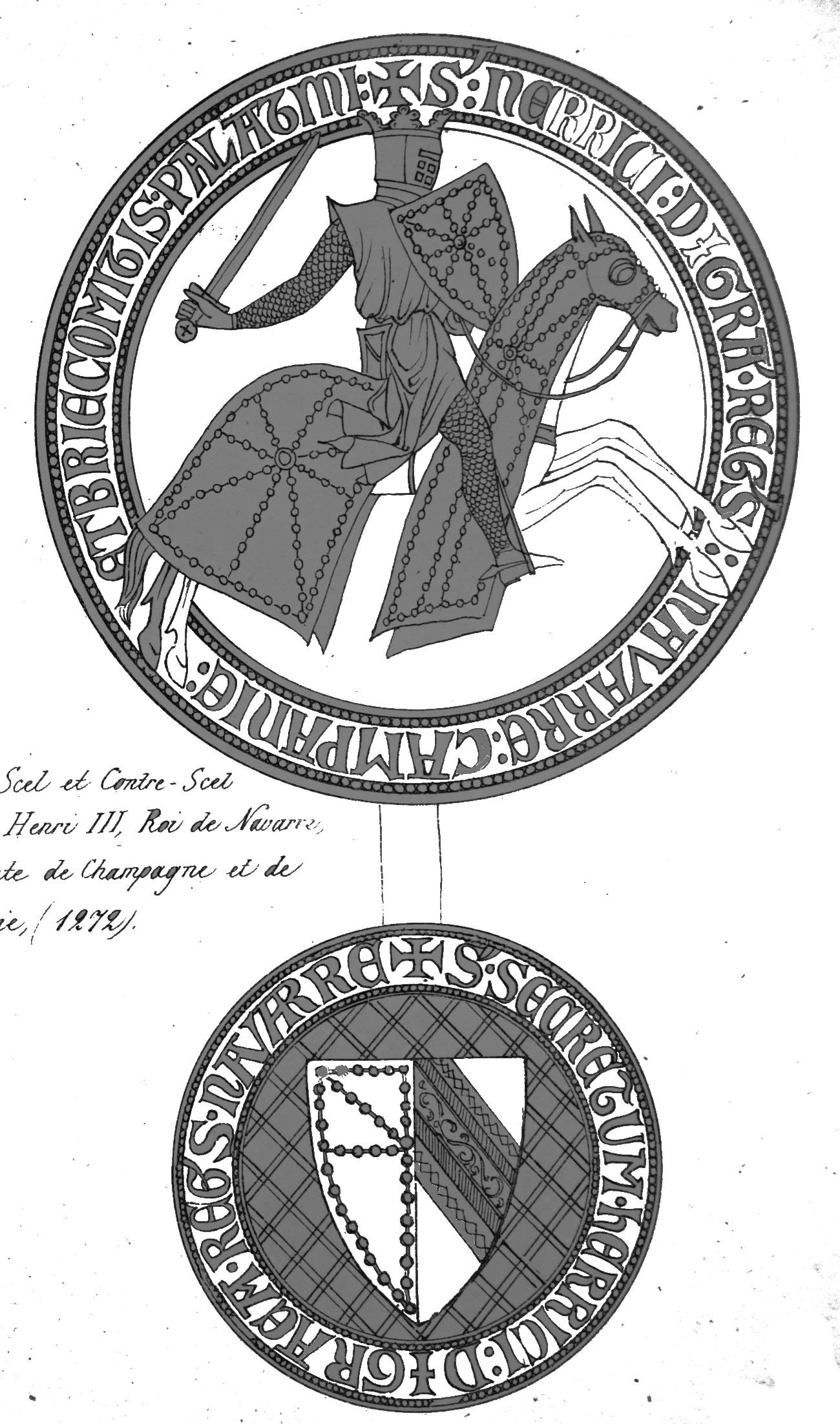 publié dans l'ouvrage de Arnaud.